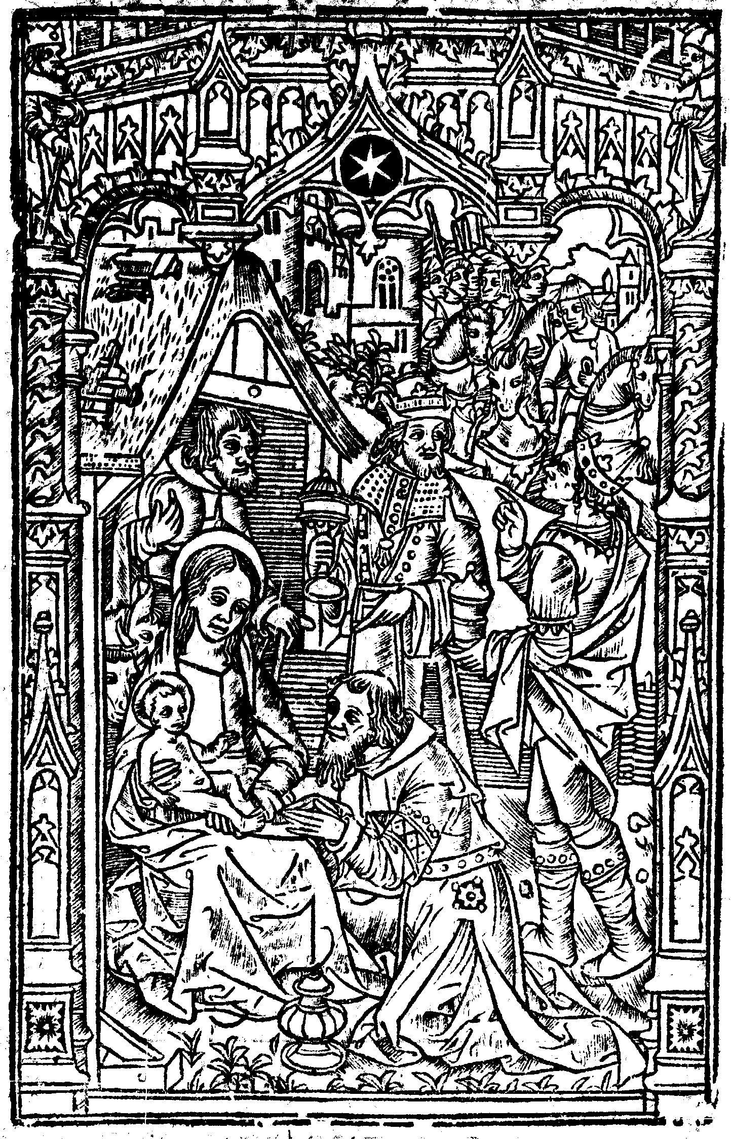 Primera pagina de Noels Nouveaux et chant pastoral, 1653